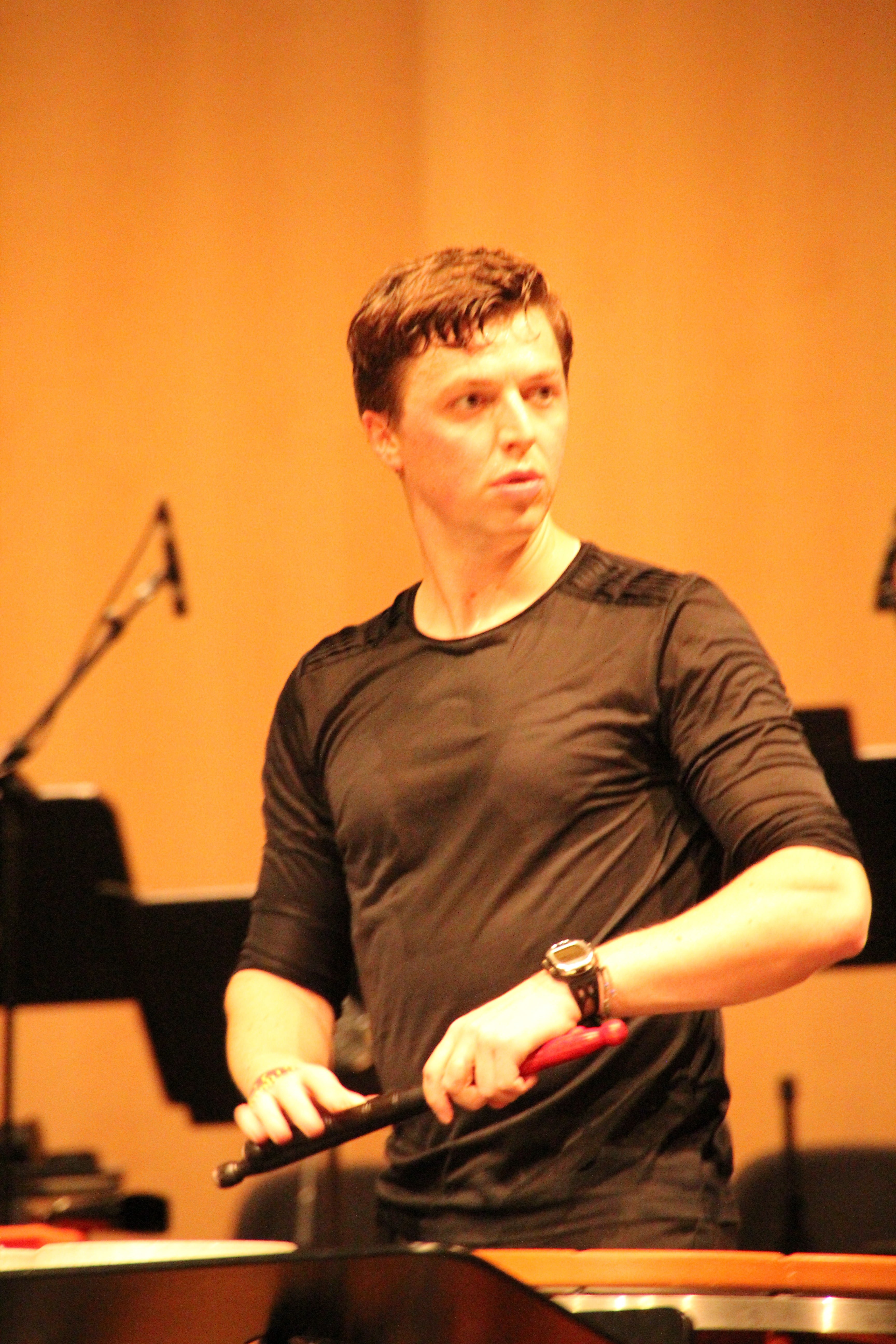 Bildinhalt: Martin Grubinger im Konzert Aufnahmeort: Baden-Baden, Deutschland